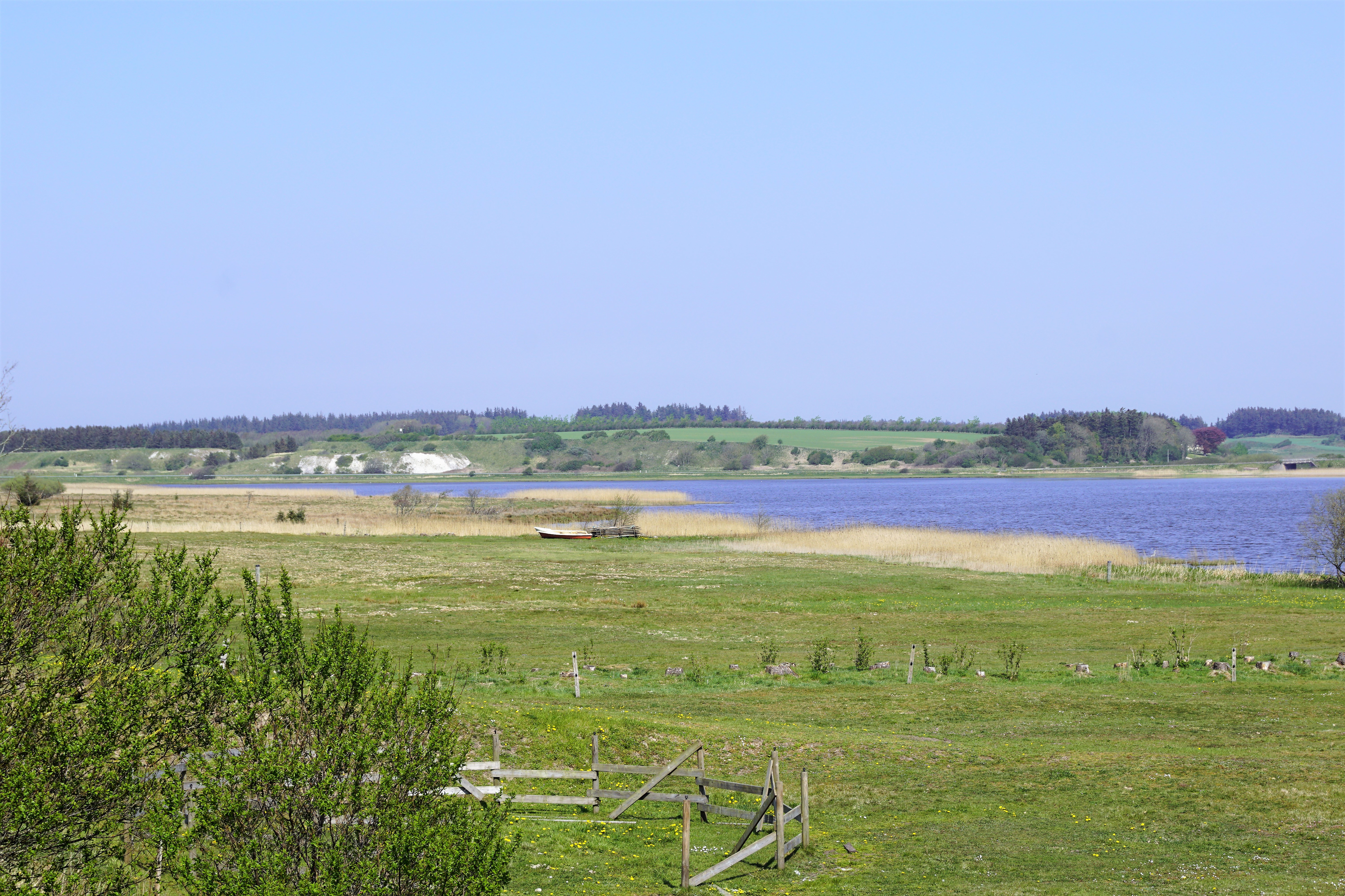 Ove Sø i Thy set mod nord